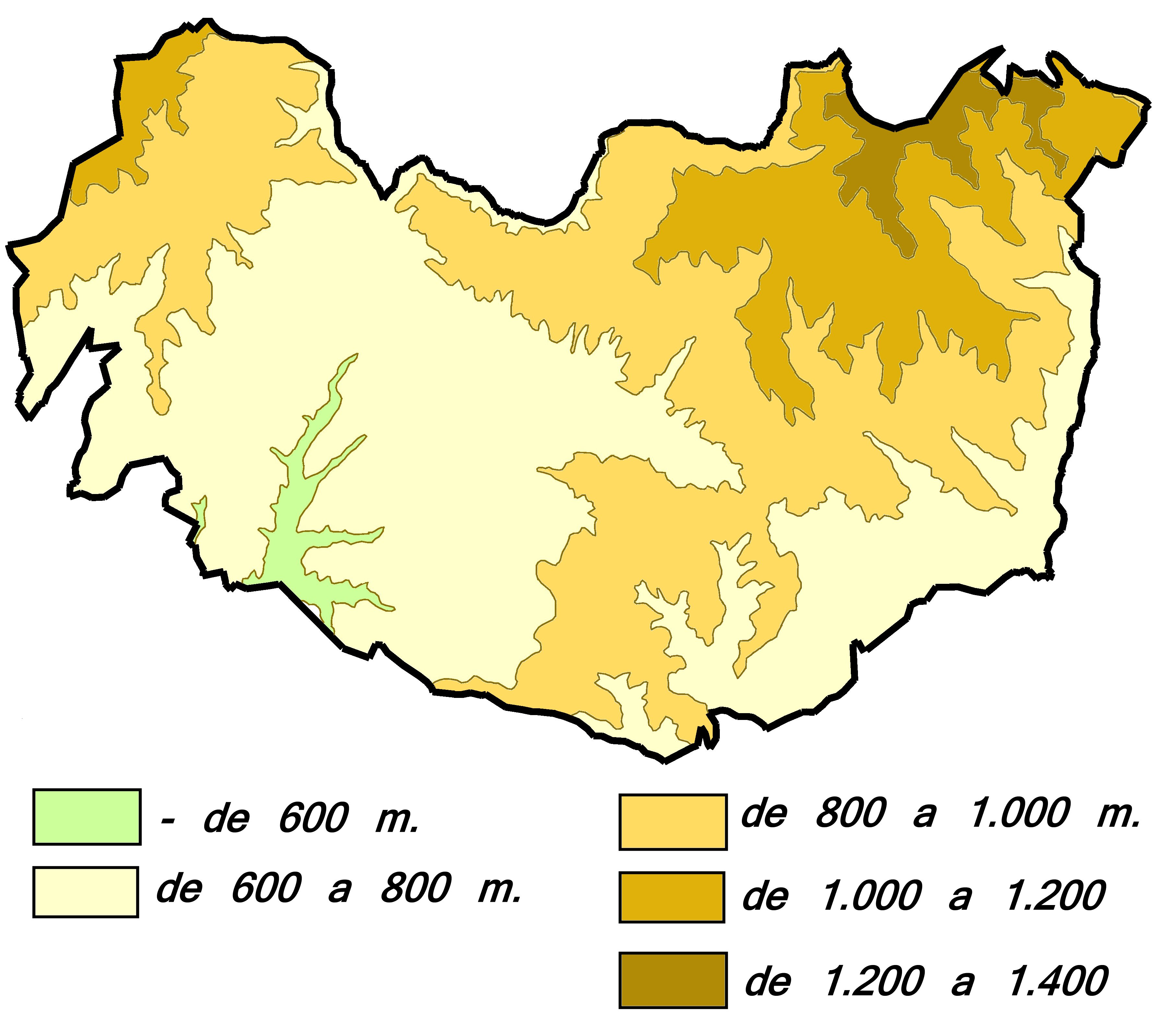 Mapa orogràfic de Lladurs (solsonès)